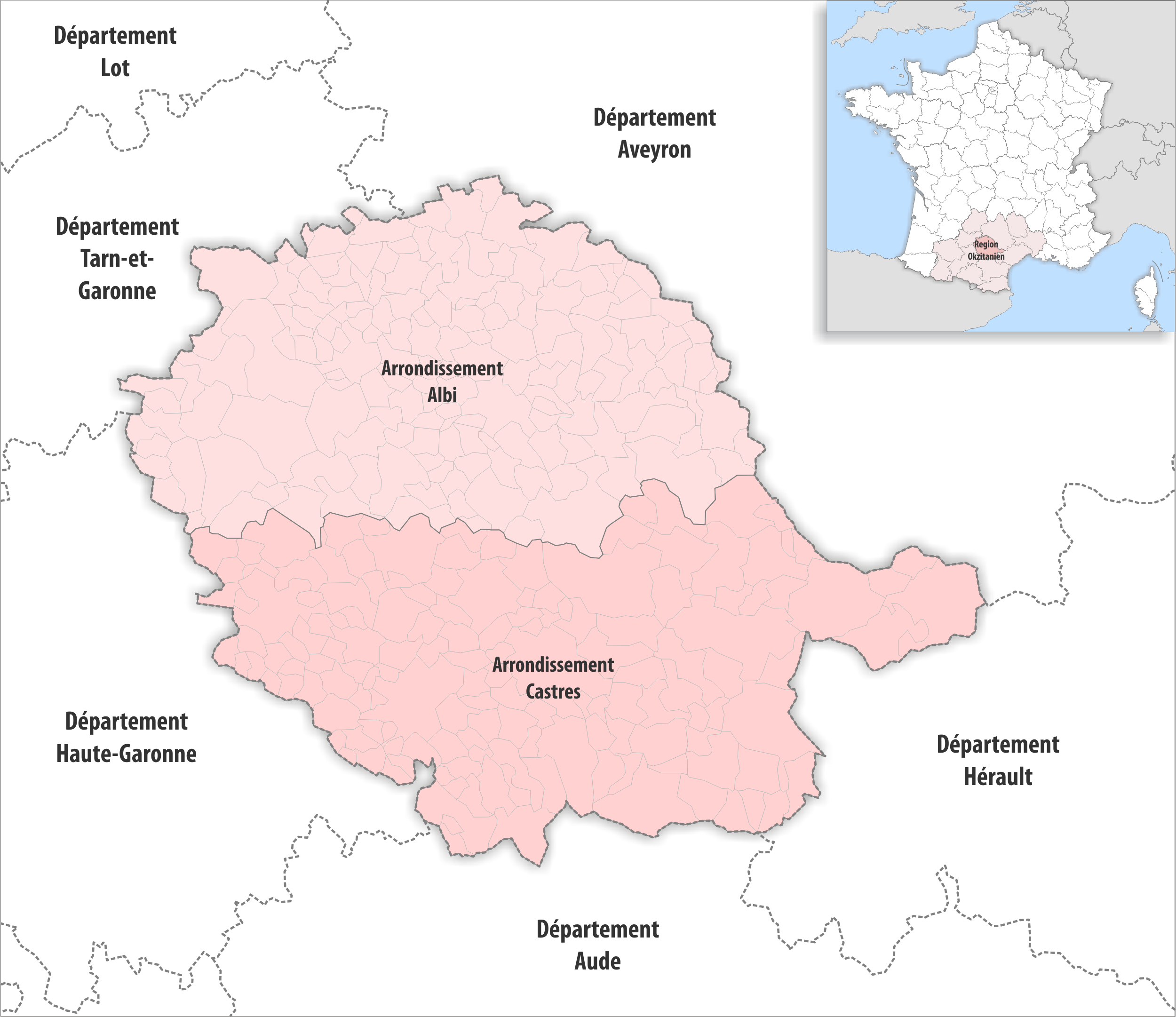 Gemeinden und Arrondissemente im Departement Tarn